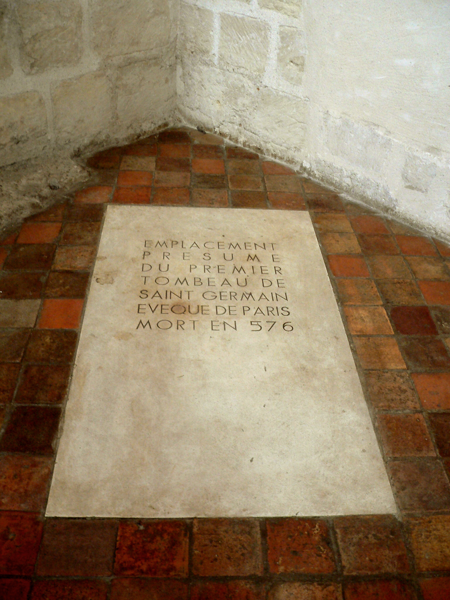 Première sépulture présumée de Saint Germain, située dans l'angle nord-est de la chapelle Saint-Symphorien reconstruite au XIe siècle.